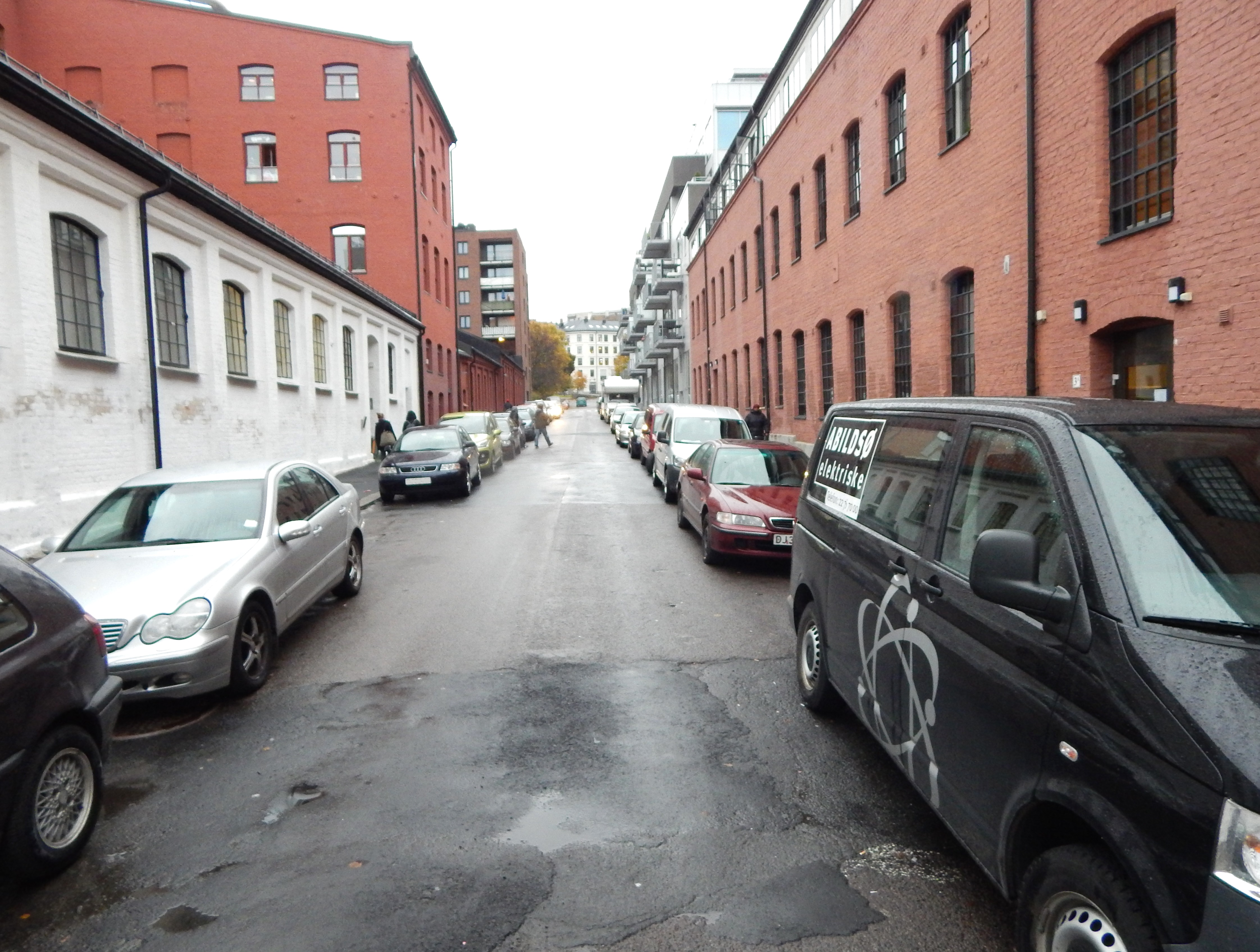 Sverres gate sett fra Åkebergveien